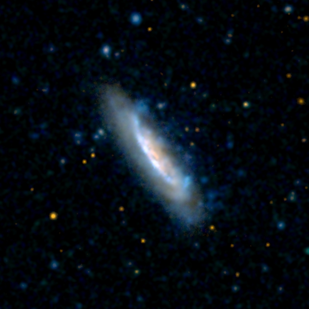 NGC 4522